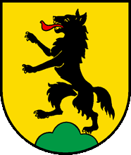 Wappen von Montmagny Kanton Waadt Schweiz